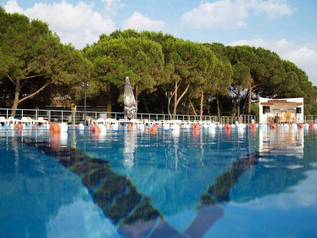 Gebze Institute of Technology's Beach Resort